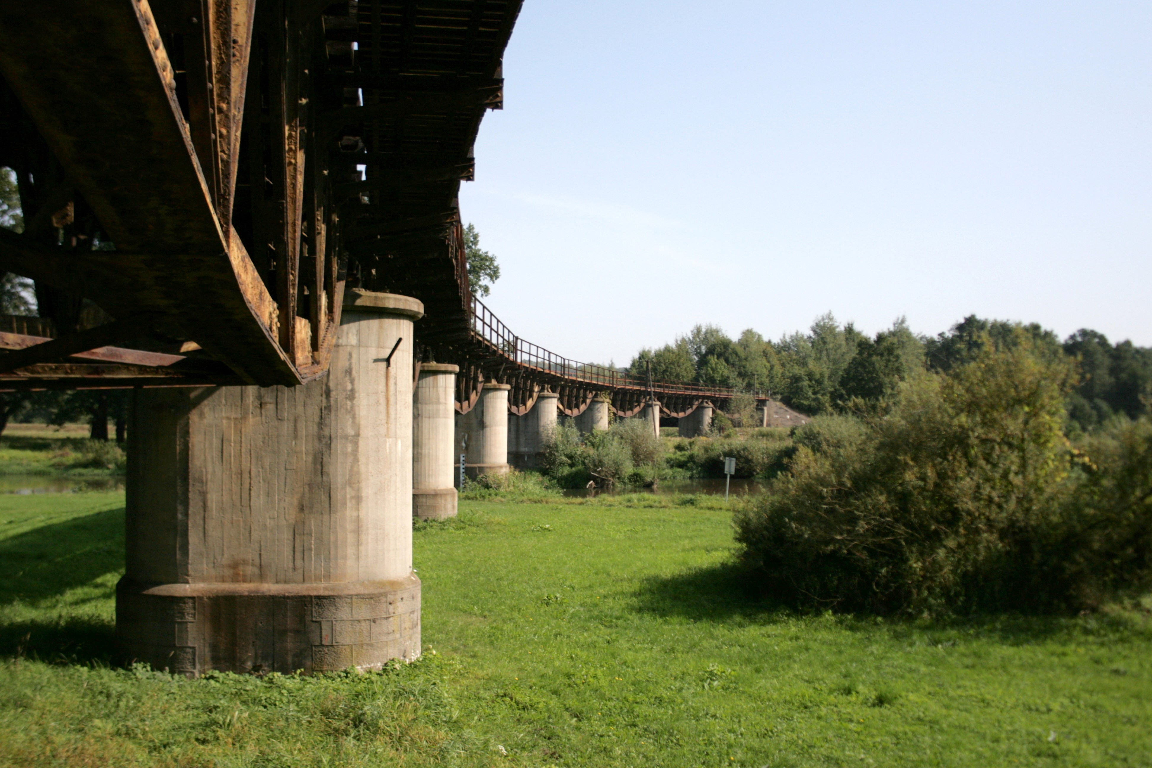 Fischbauchbrücke über die Neisse in Bad Muskau